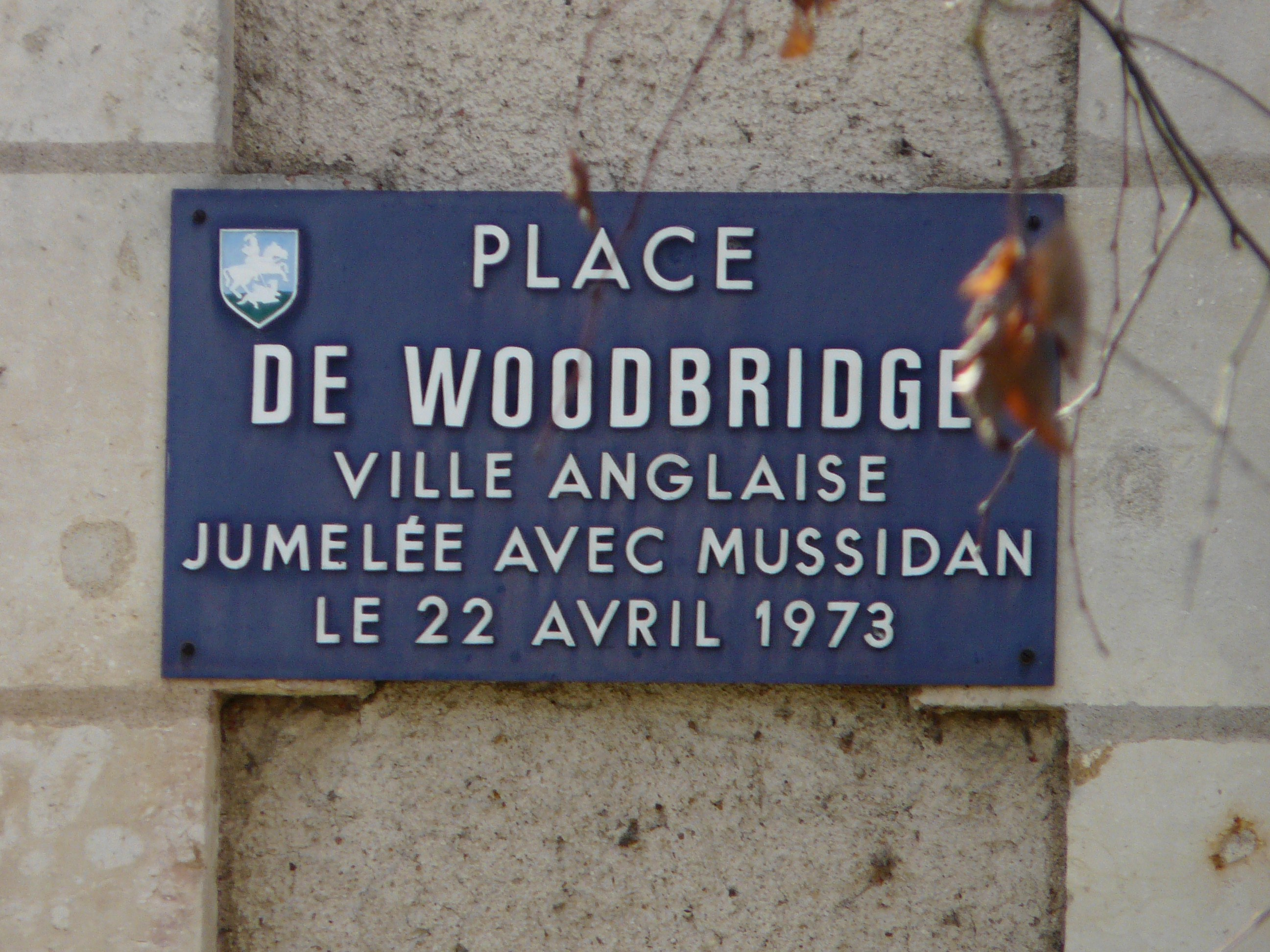 Plaque de rue indiquant le jumelage entre Mussidan et Woodbridge ; Mussidan, Dordogne, France.